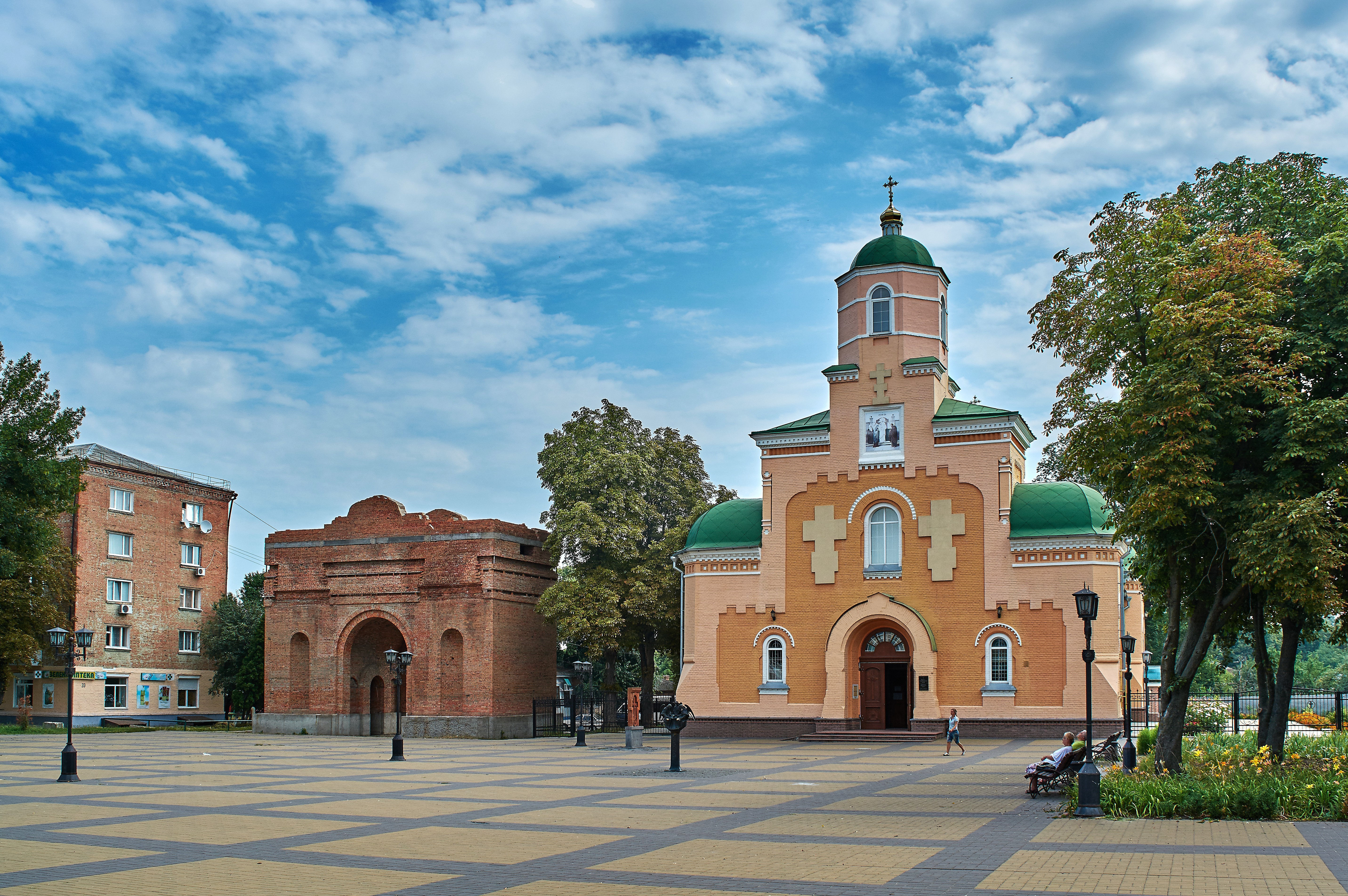 Середньовічне місто Прилуки, Прилуки, на узбережжі правобер. тераси р. Удаю при її вигині